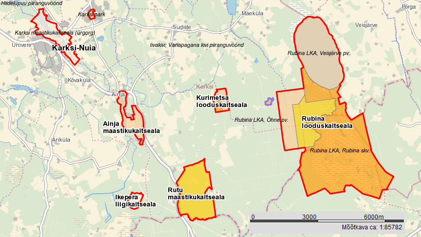 Rubina LKA ja Rutu MKA Maa-ameti kaardil.